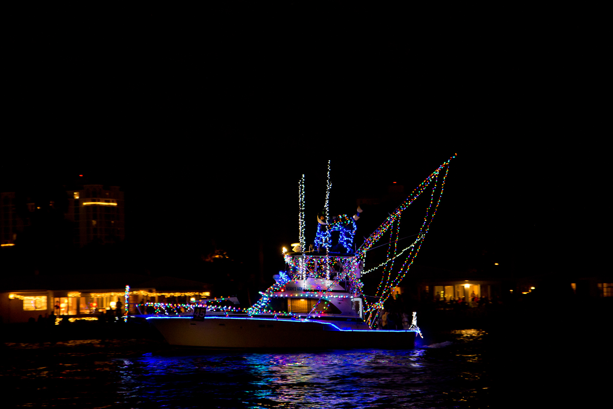 Colour